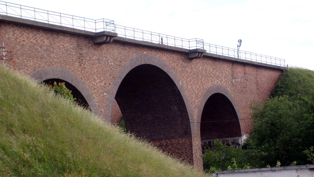 Jabłonowo Pomorskie - mosty kolejowe zbudowane pod koniec XIX wieku